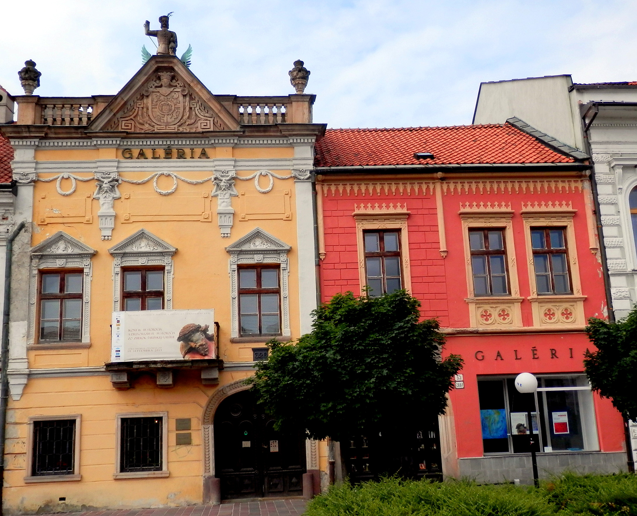 Galéria. Mestská pamiatková zóna, historické meštianske domy. Ulica Hlavná. Mesto Prešov.